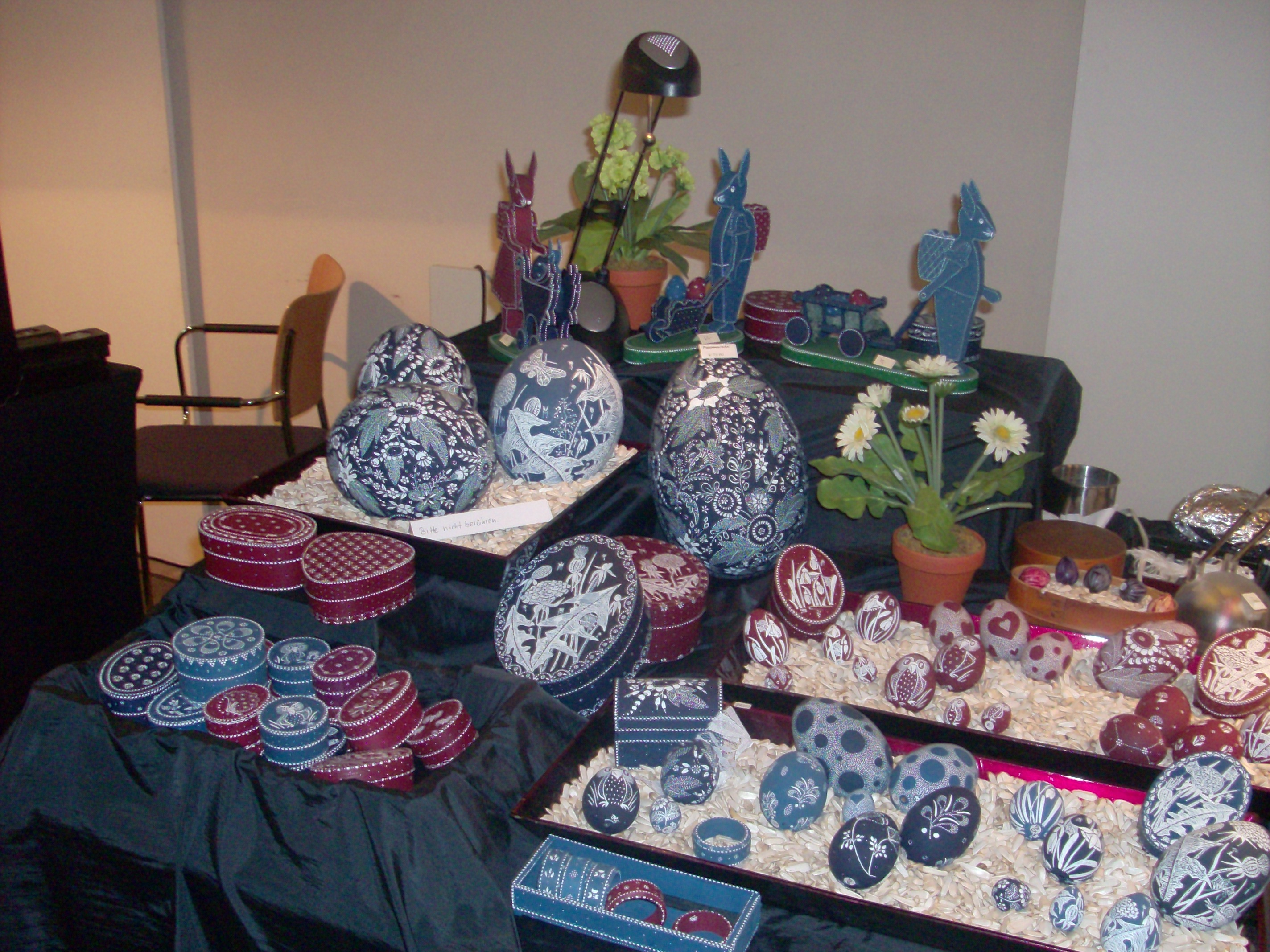 Ostereier auf dem Ostereiermarkt Bödexen